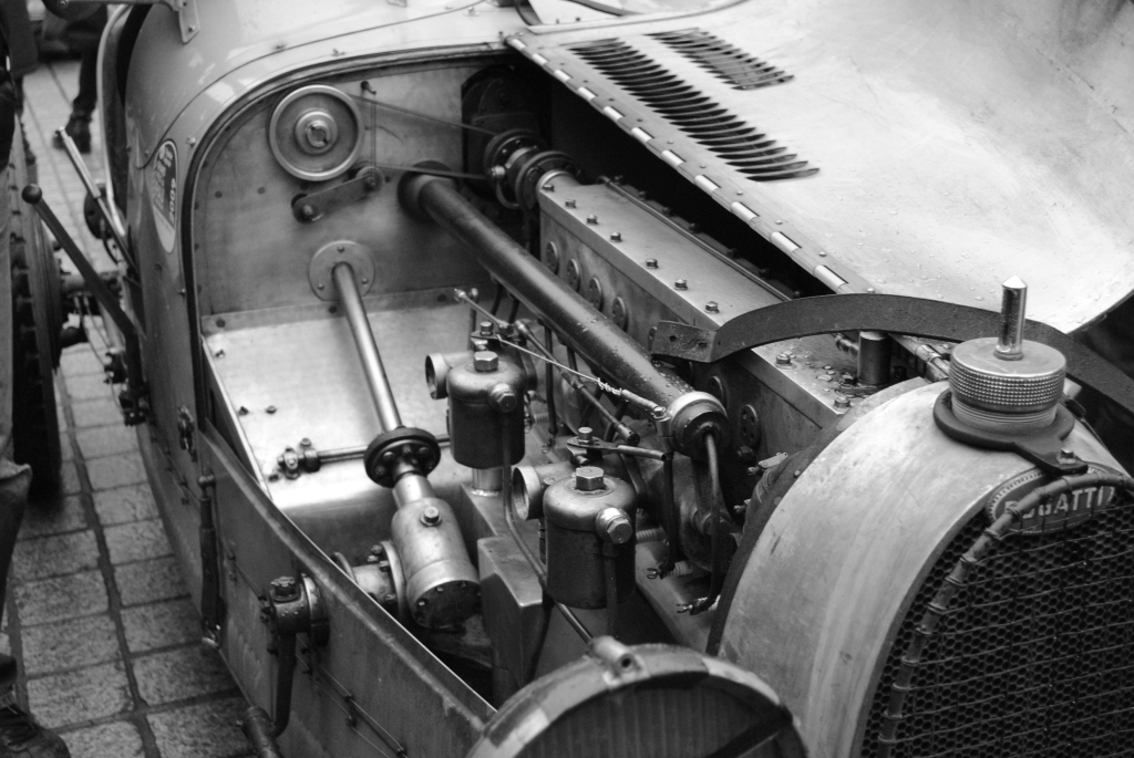 Moteur d'une Bugatti Type 35 exposée lors de l'événement « Vincennes en Anciennes » à Paris